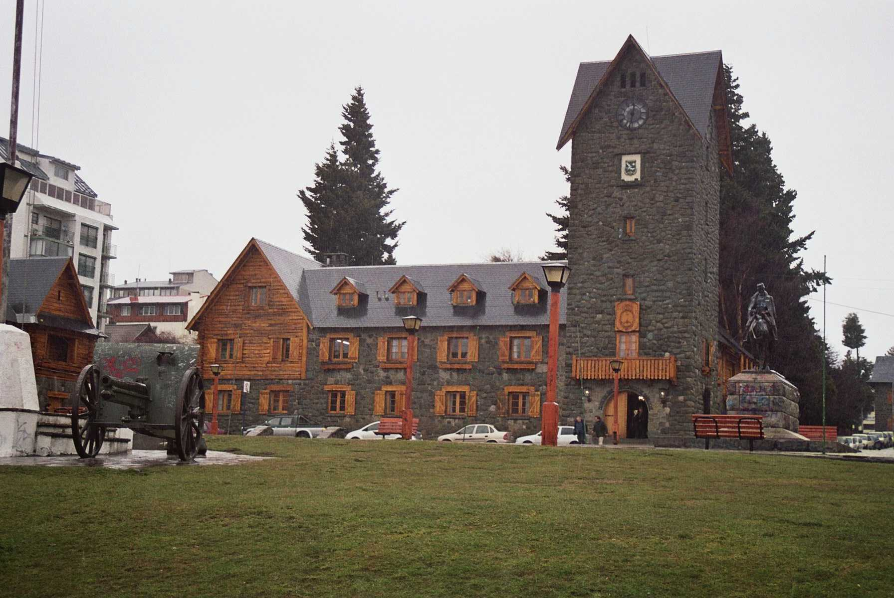 Centro Cívico, Bariloche (Argentina)